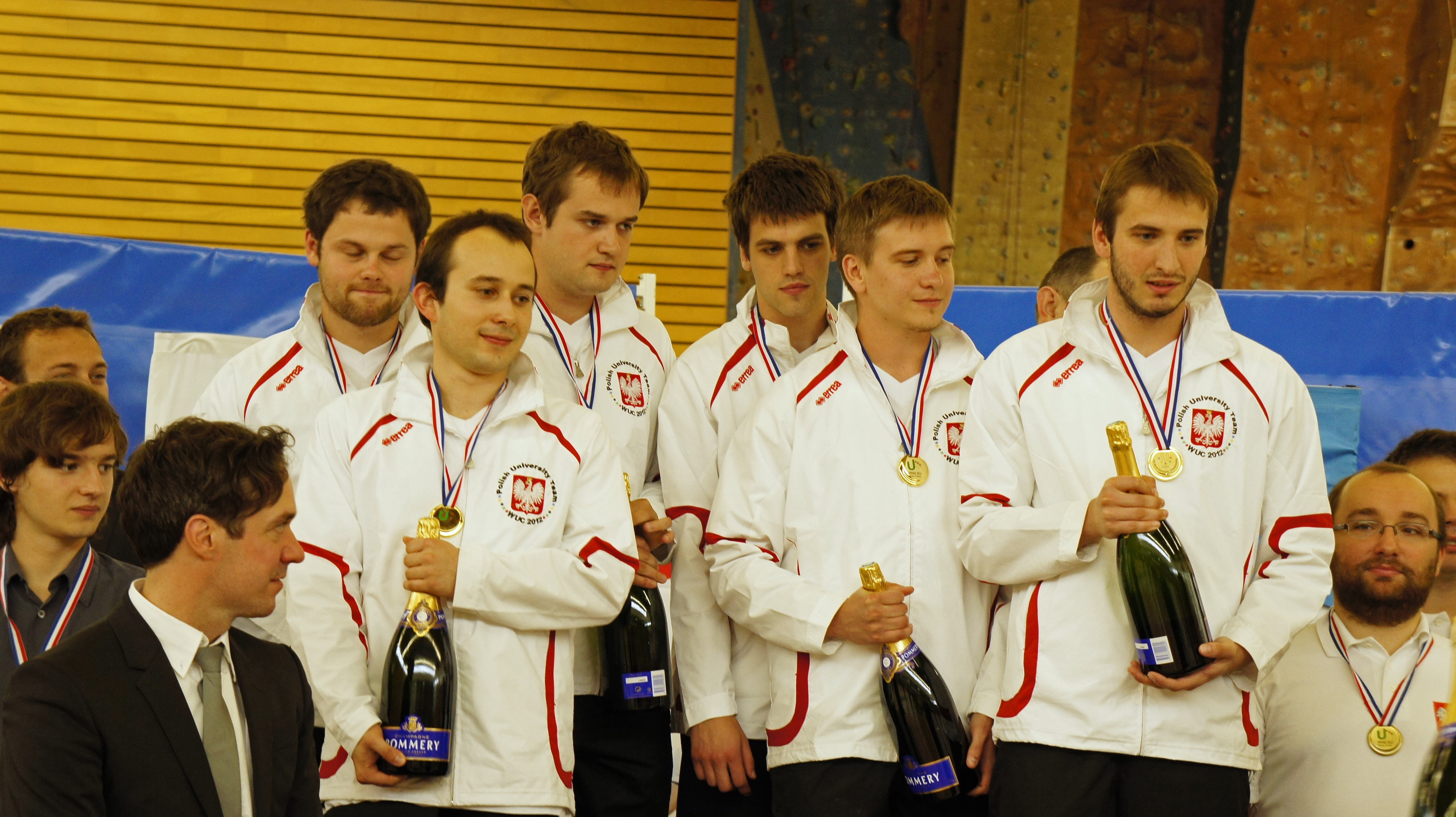 Les premiers lors du 6eme championnat du monde universitaire de bridge, l'équipe de Pologne.